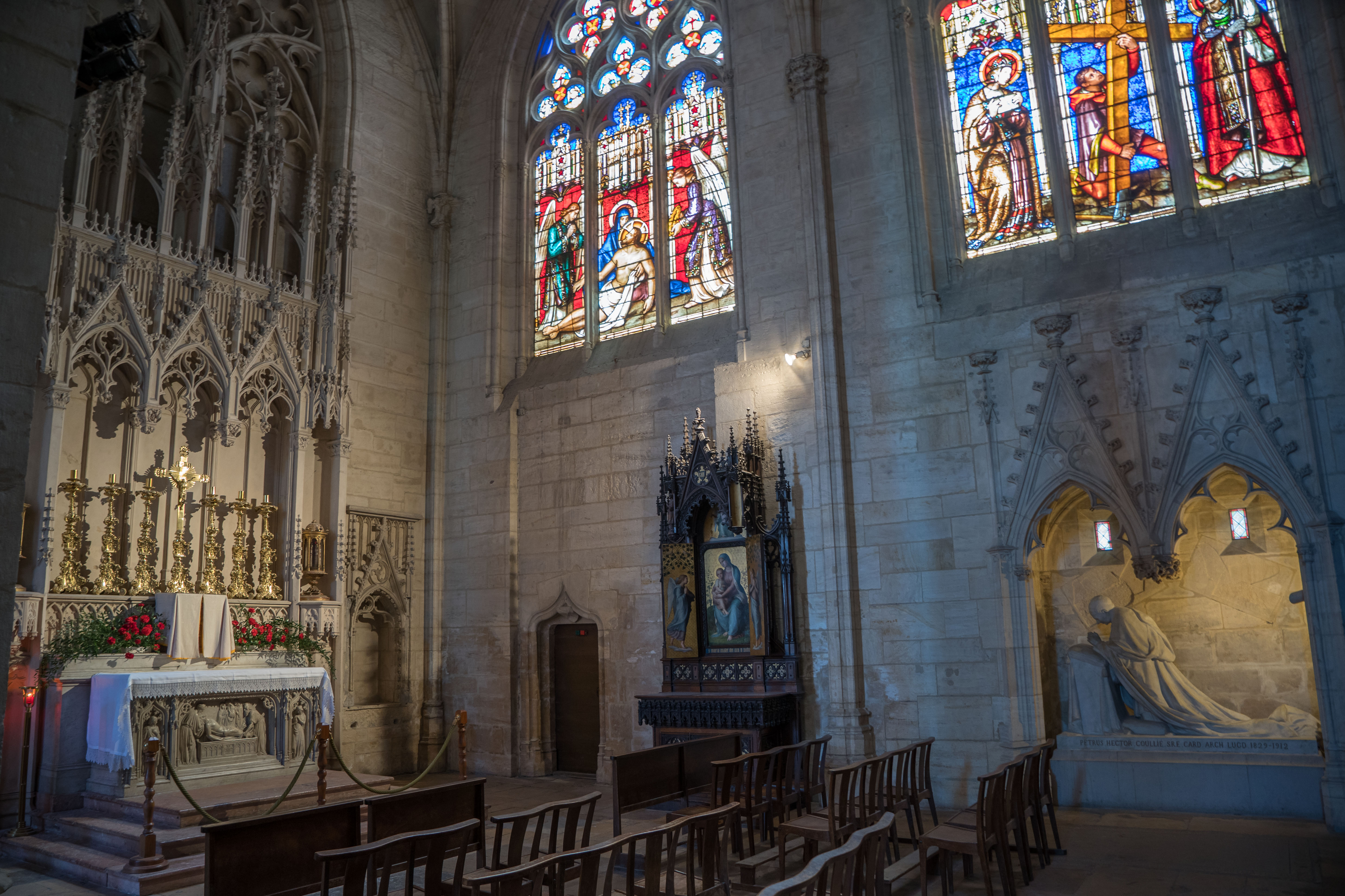 Lyon - Primatiale Saint-Jean - chapelle saint Vincent de Paul